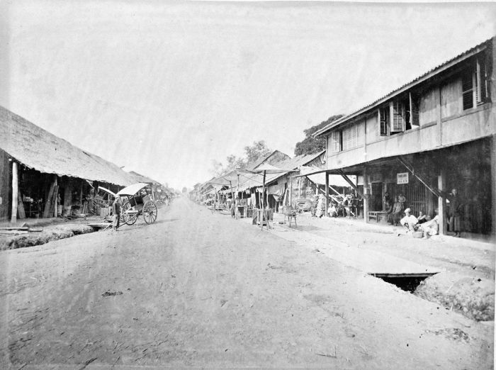 Foto. Kampong Bindjai met rechts huis een Chinees dobbelhuis.